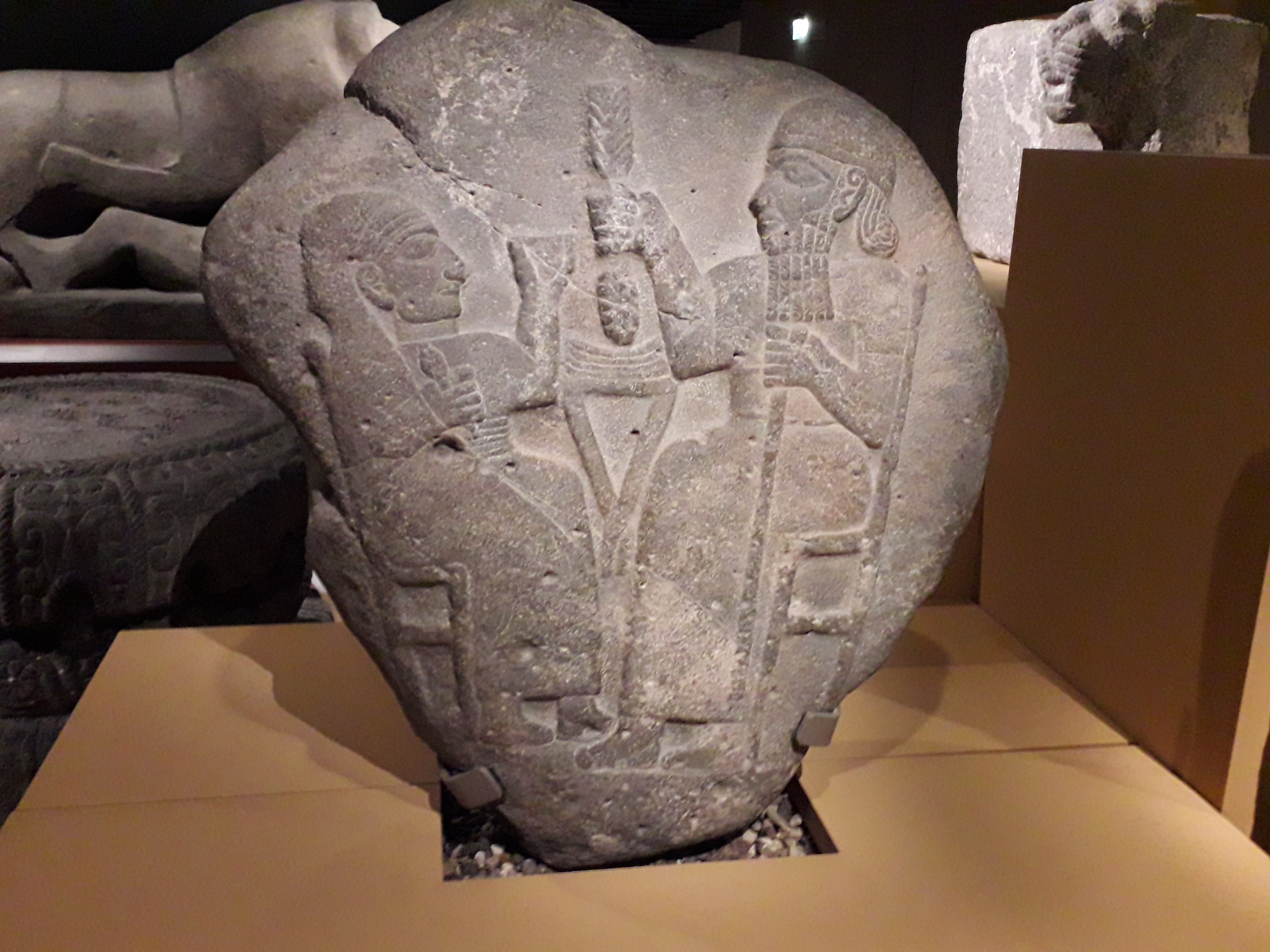 Stèle funéraire du royaume néo-hittite de Gurgum. Région de Maras (Turquie). 900-800 avant J.-C. Basalte. Jérusalem, prêté par le Bible Lands Museum, BLMJ 01060. Exposé au Musée du Louvre en 2019 pour l'exposition "Royaumes oubliés, de l'empire hittite aux Araméens". Légende dans l'exposition "Royaumes oubliés" : "La scène nous montre un couple assis face à face de part et d'autre d'une table couverte de pain. L'homme tient un bâton, comme certaines représentations royales (par exemple à Zincirli) ainsi qu'un épi de blé et une grappe de raisin symbolisant certainement la vie après la mort. La femme tient une coupe ainsi qu'un fuseau qui évoque probablement son statut de femme mariée. C'est aussi un symbole qui évoque le fil de l'existence. La composition générale, avec le couple banquetant autour d'une table chargée de victuailles, est un motif typique du monde syro-anatolien tant dans la glyptique que dans la sculpture monumentale, que l'on retrouve depuis la période du Bronze Moyen au IIe millénaire av. J.-C."